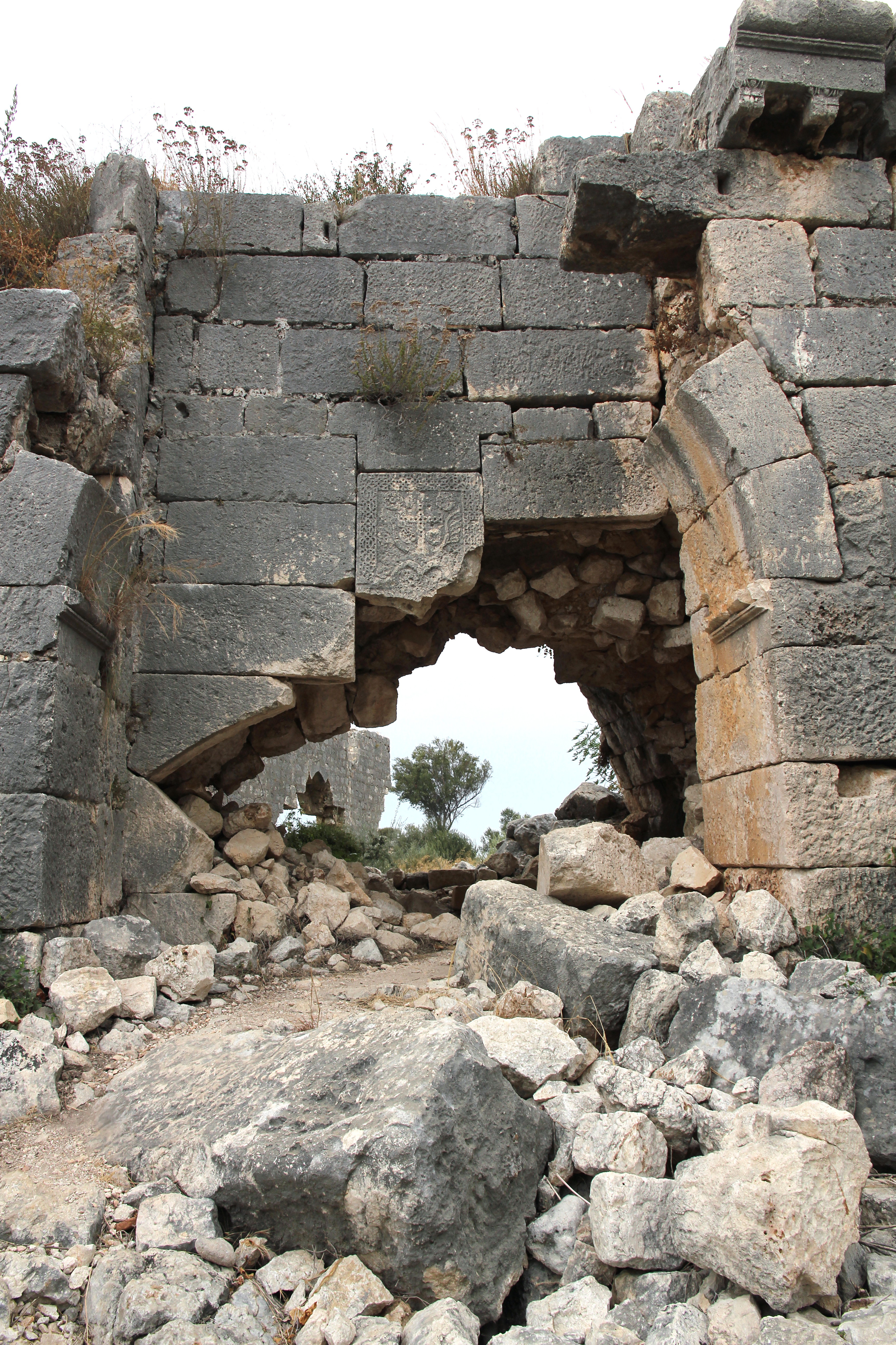 Korykos, Landburg bei Kızkalesi, Südtürkei, innerer Eingang im Osten mit armenischem Kreuzrelief